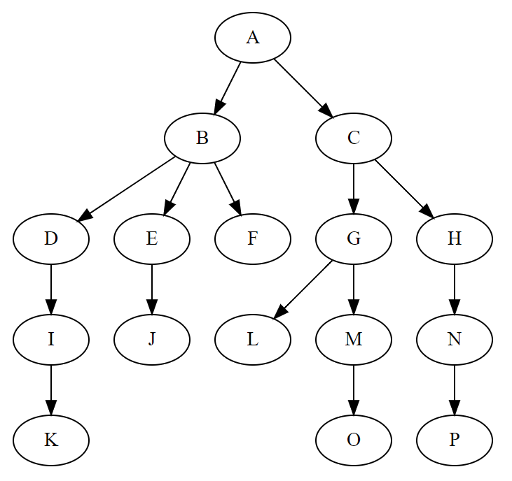 自制的